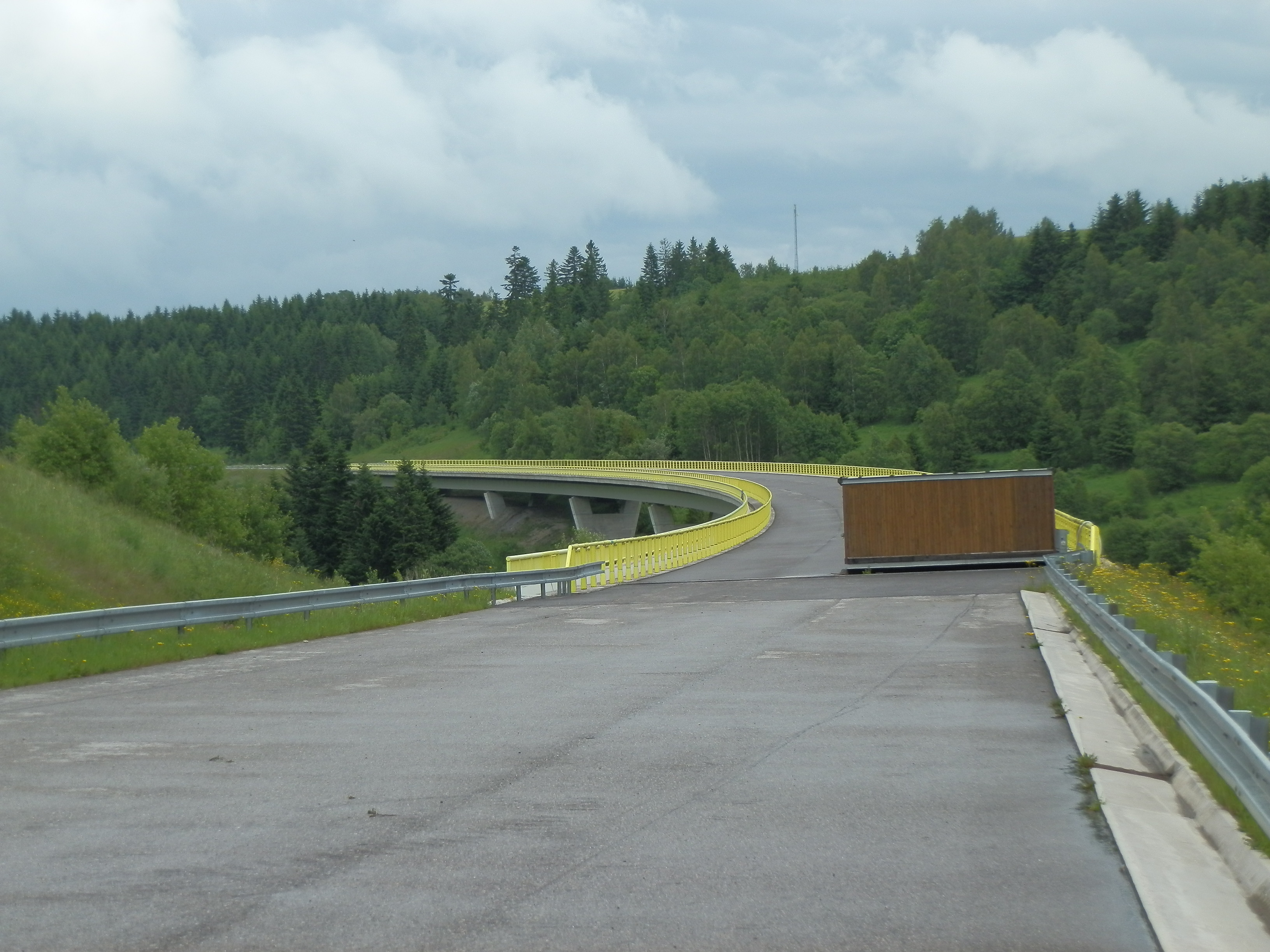 Dialnica nikam